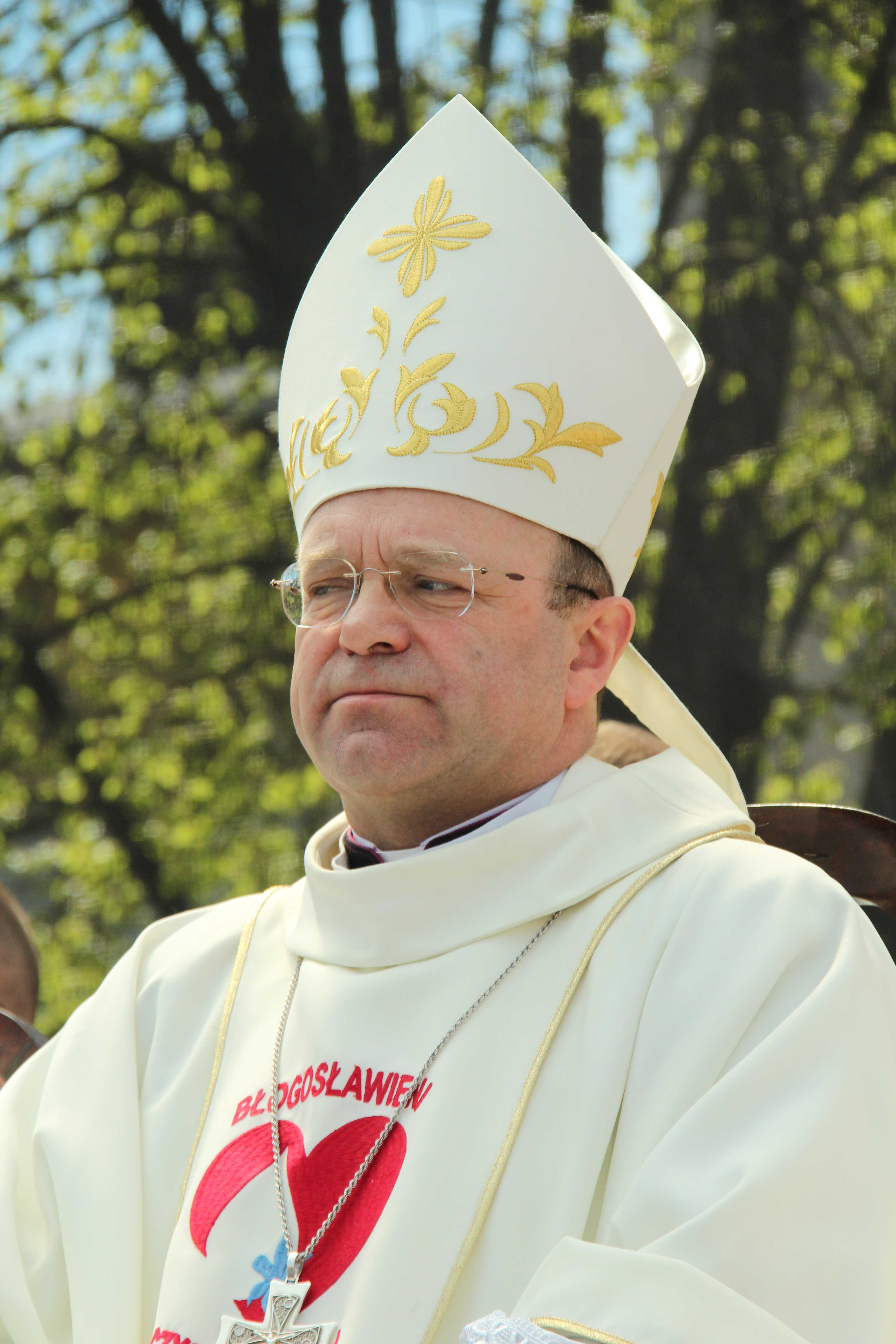 Bp Henryk Wejman - biskup pomocniczy archidiecezji szczecińsko-kamieńskiej w czasie Mszy Świętej w Barlinku, 3 maja 2015.